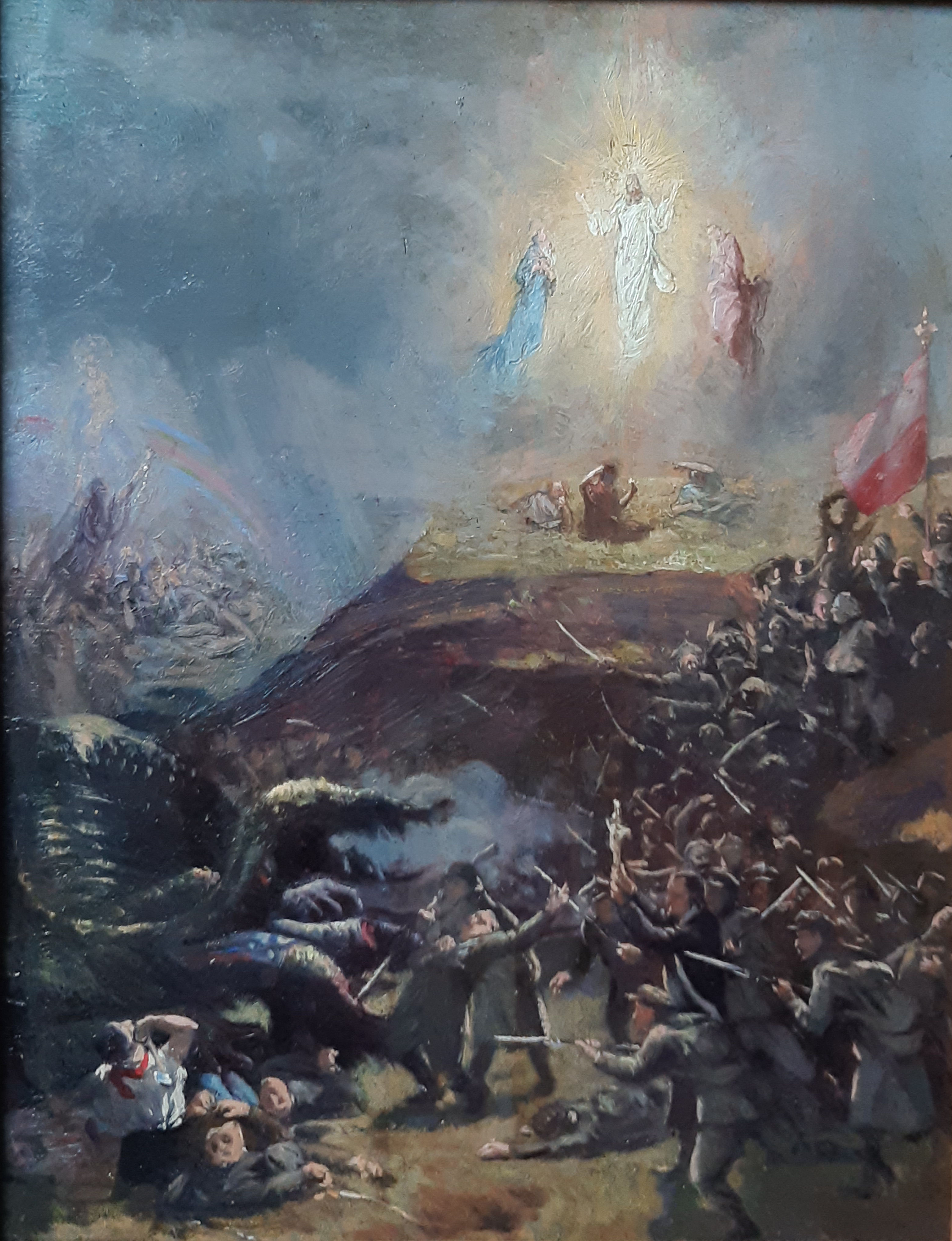 Cud nad Wisłą, Bolesław Antoni Nawrocki (1877-1946), Warszawa 1920, olej/deska, 34,4 x 27,5 cm, Kolekcja Bolesława i Liny Nawrockich, fot. M.Nawrocka